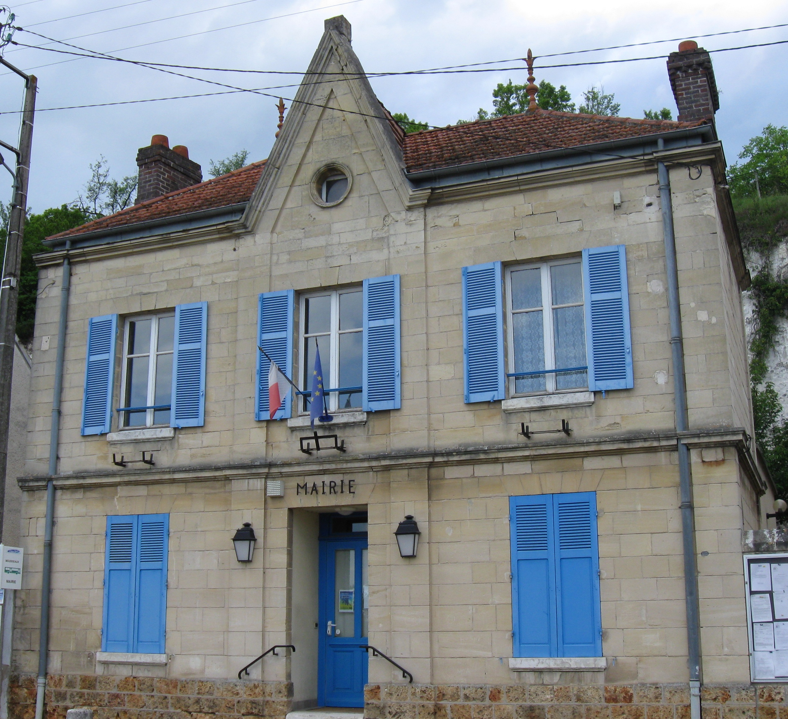 Mairie de Mousseaux-sur-Seine. (département des Yvelines, région Île-de-France).